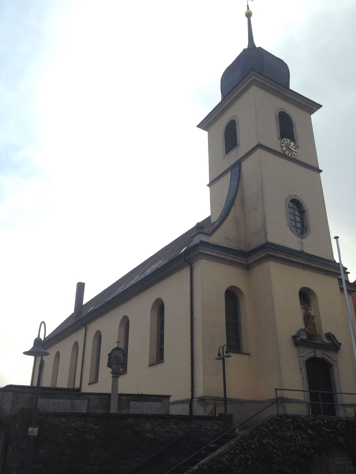 Die Kirche St.Ägidius in Krensheim von außen